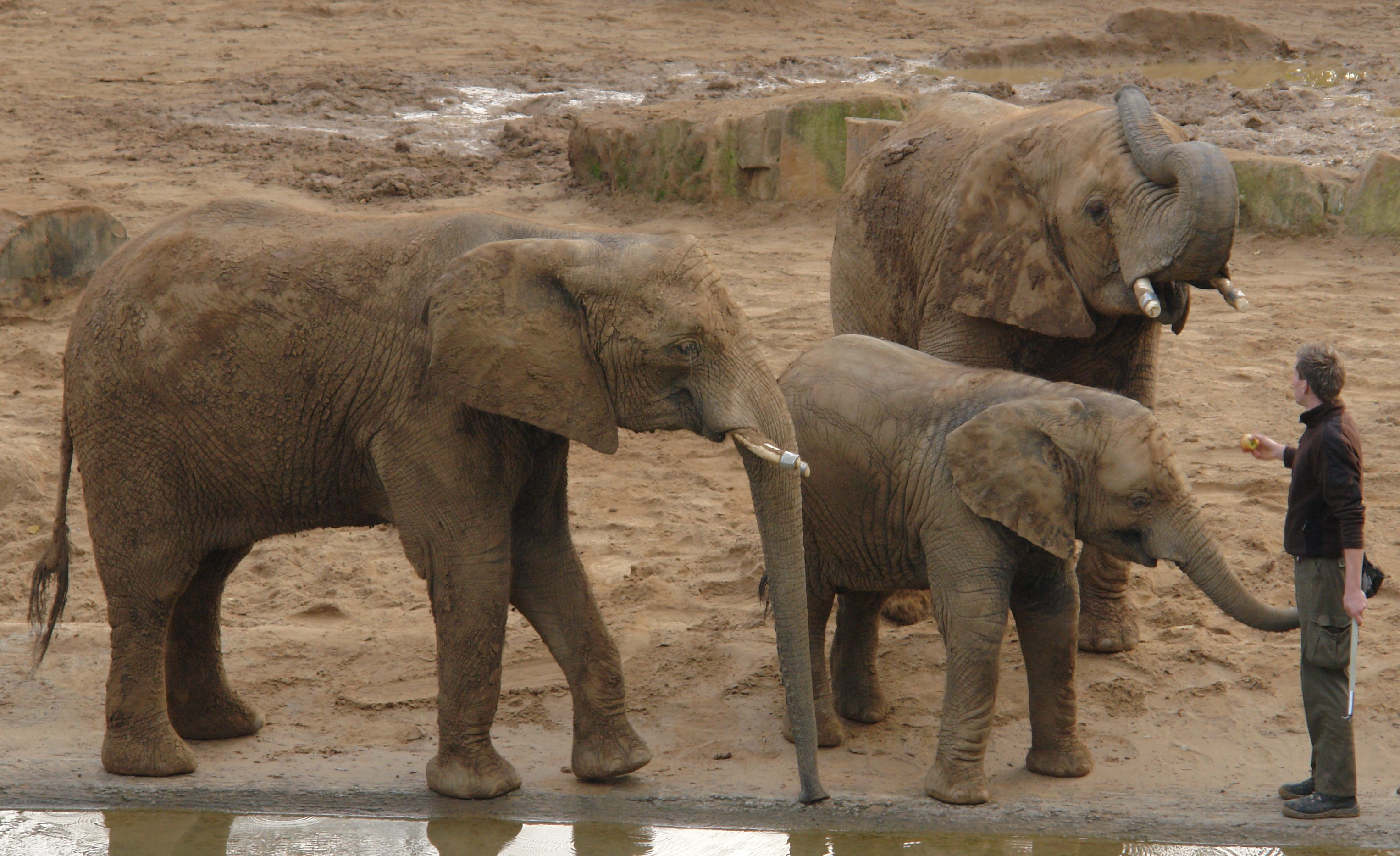 Elefantengehege im Dresdner Zoo entstanden während des Linux-Info-Tag Zoo-Mapping